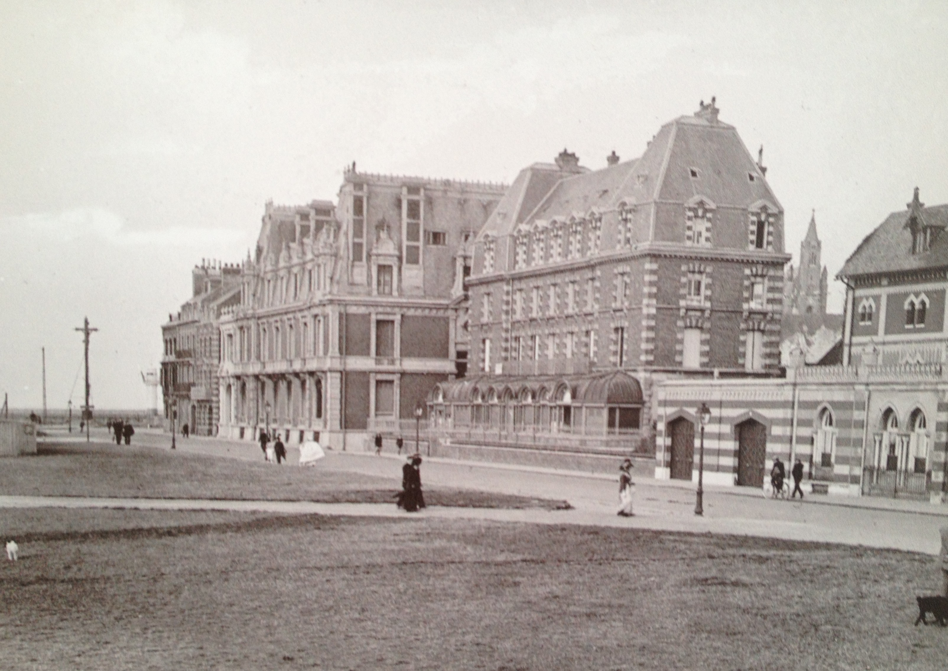 Villa du prince Michel Sturdza à Dieppe